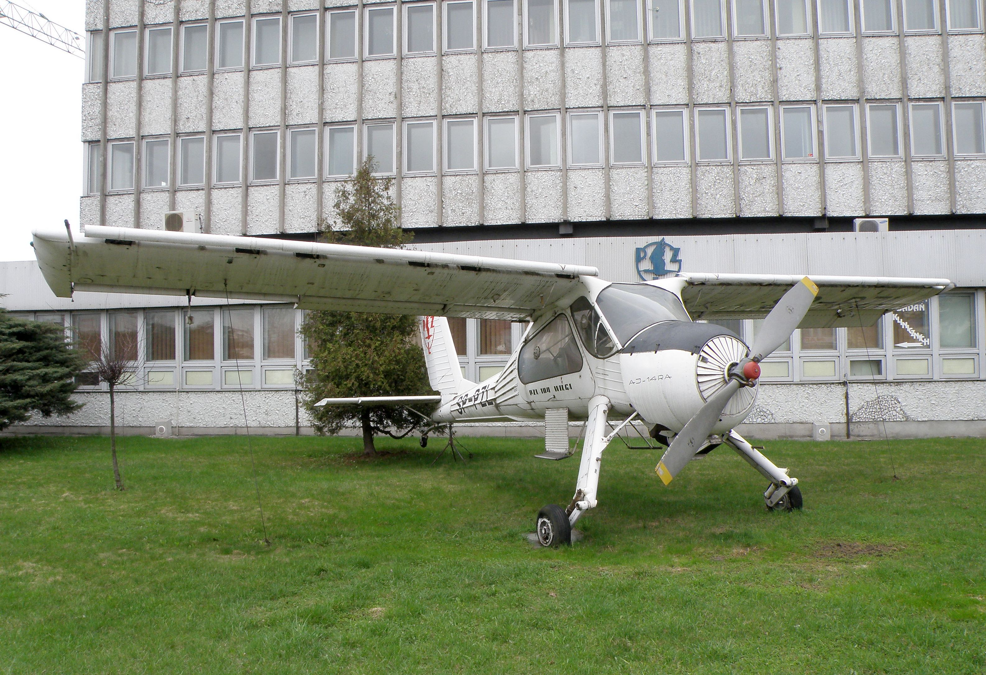 PZL-104 Wilga model 40, stojący przed EADS PZL Warszawa-Okęcie, Al. Krakowska